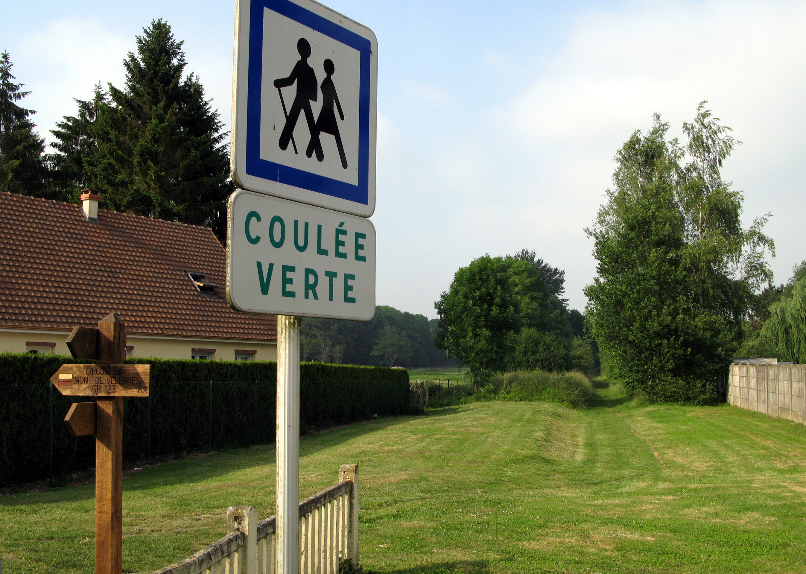 Loeuilly (Somme, France) - La "coulée verte", sur le tracé d'une ancienne ligne de chemin de fer.